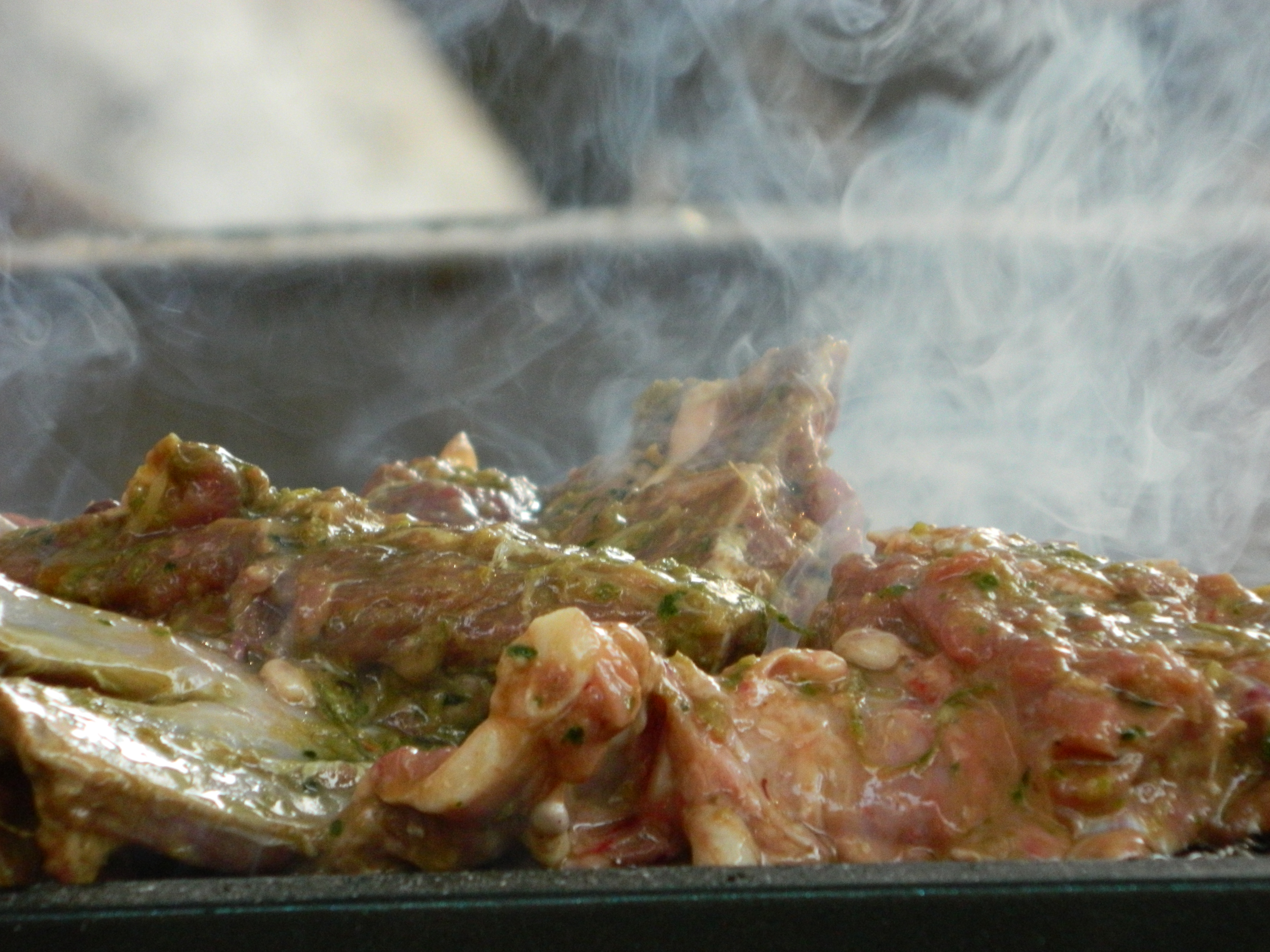 Des côtes de mouton en train d'être grillées, peu après le sacrifice du mouton pour la fête de Tabaski (Aïd El Ada) à Bamako, Mali. This is an image of food from Mali